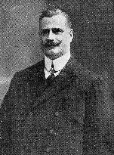 Adolfo Fojo Silva, fotografía en Vida Gallega 1933